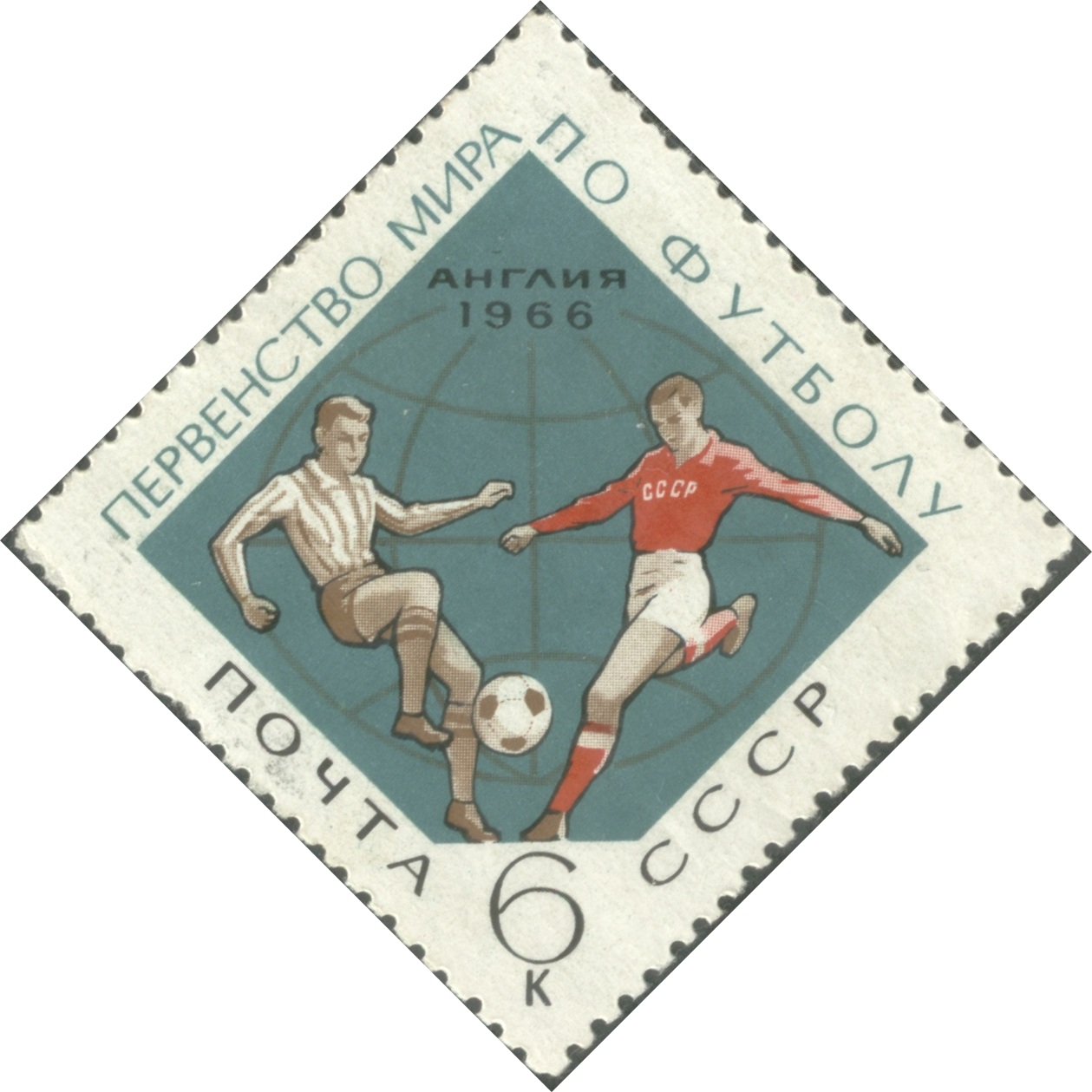 Почтовая марка СССР. 1966. Первенство мира по футболу